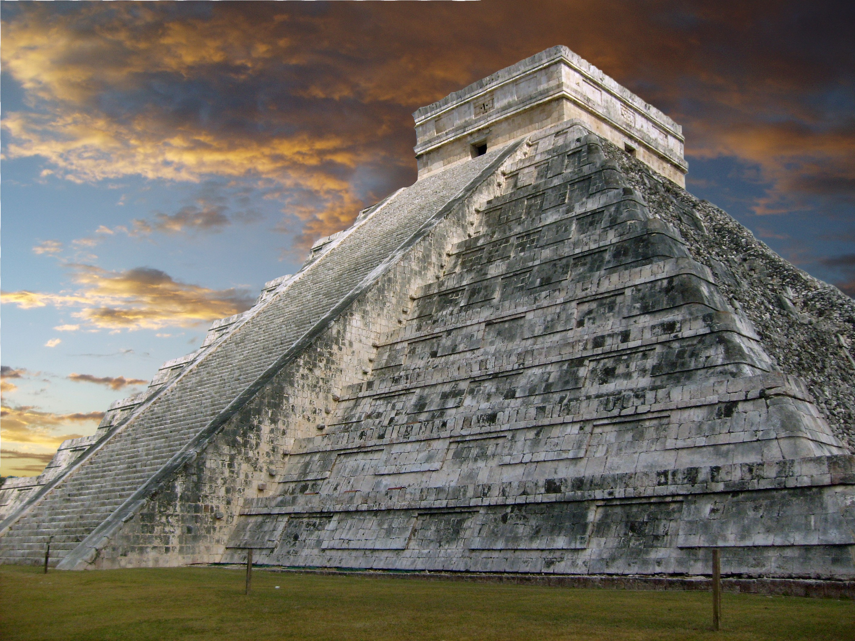 un atardecer en chichen itza